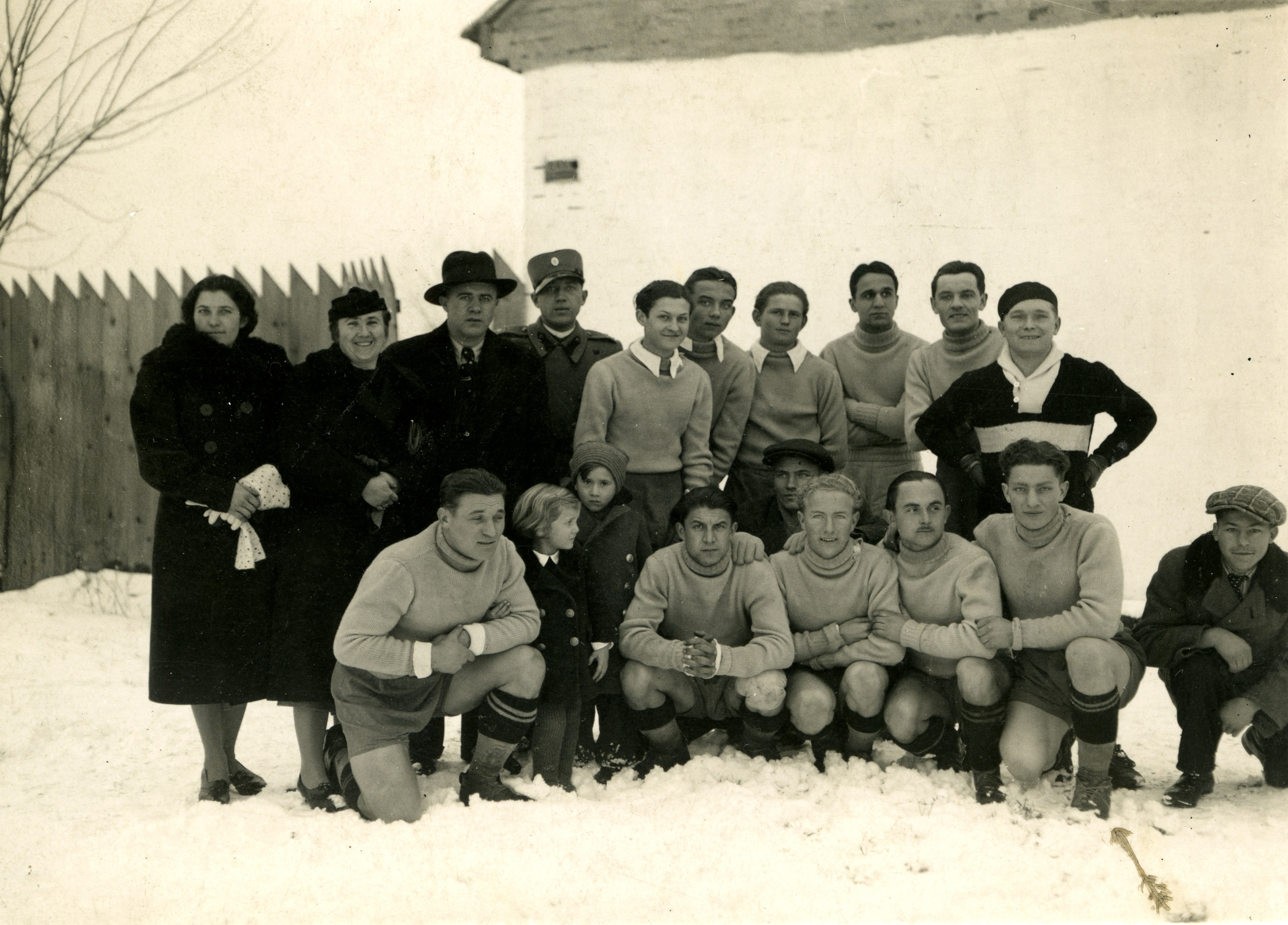 a város futballcsapata. Location: Croatia, Vinkovci Tags: soccer team, winter, snow Title: a város futballcsapata.